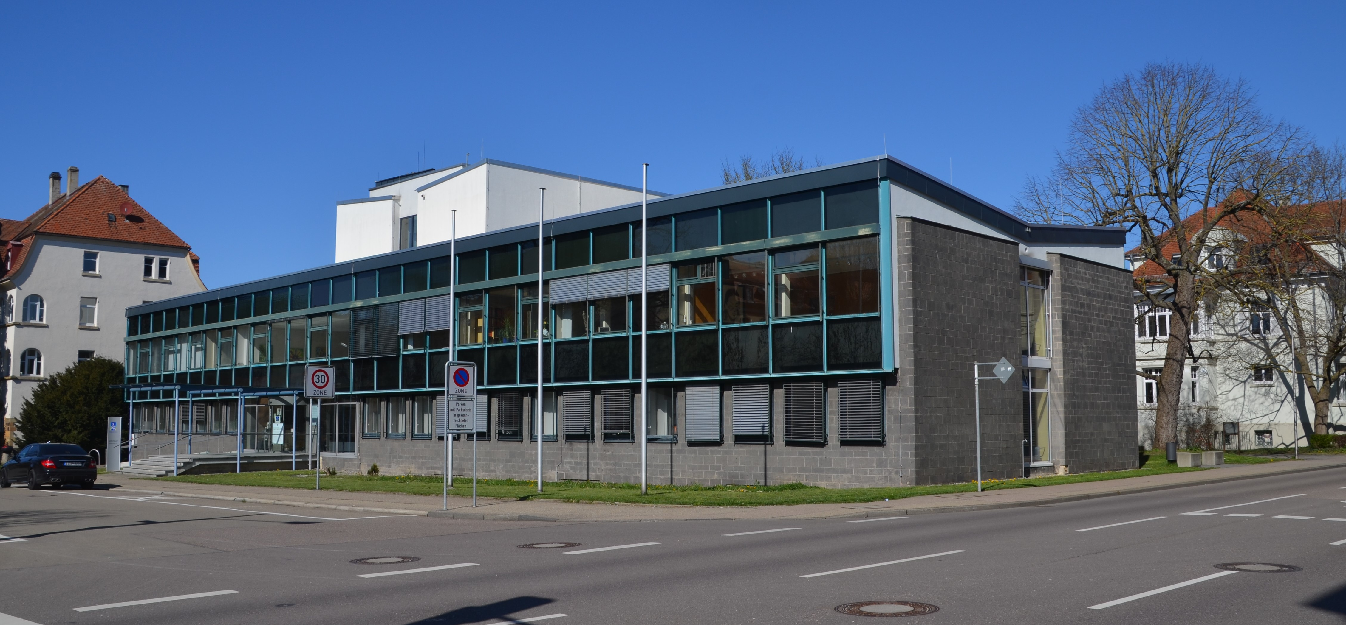 Landratsamt Schwäöbisch Gmünd von Südwest